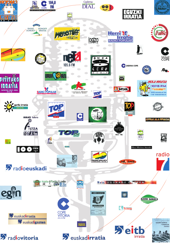 Euskal Herrian emititzen duten irratiak